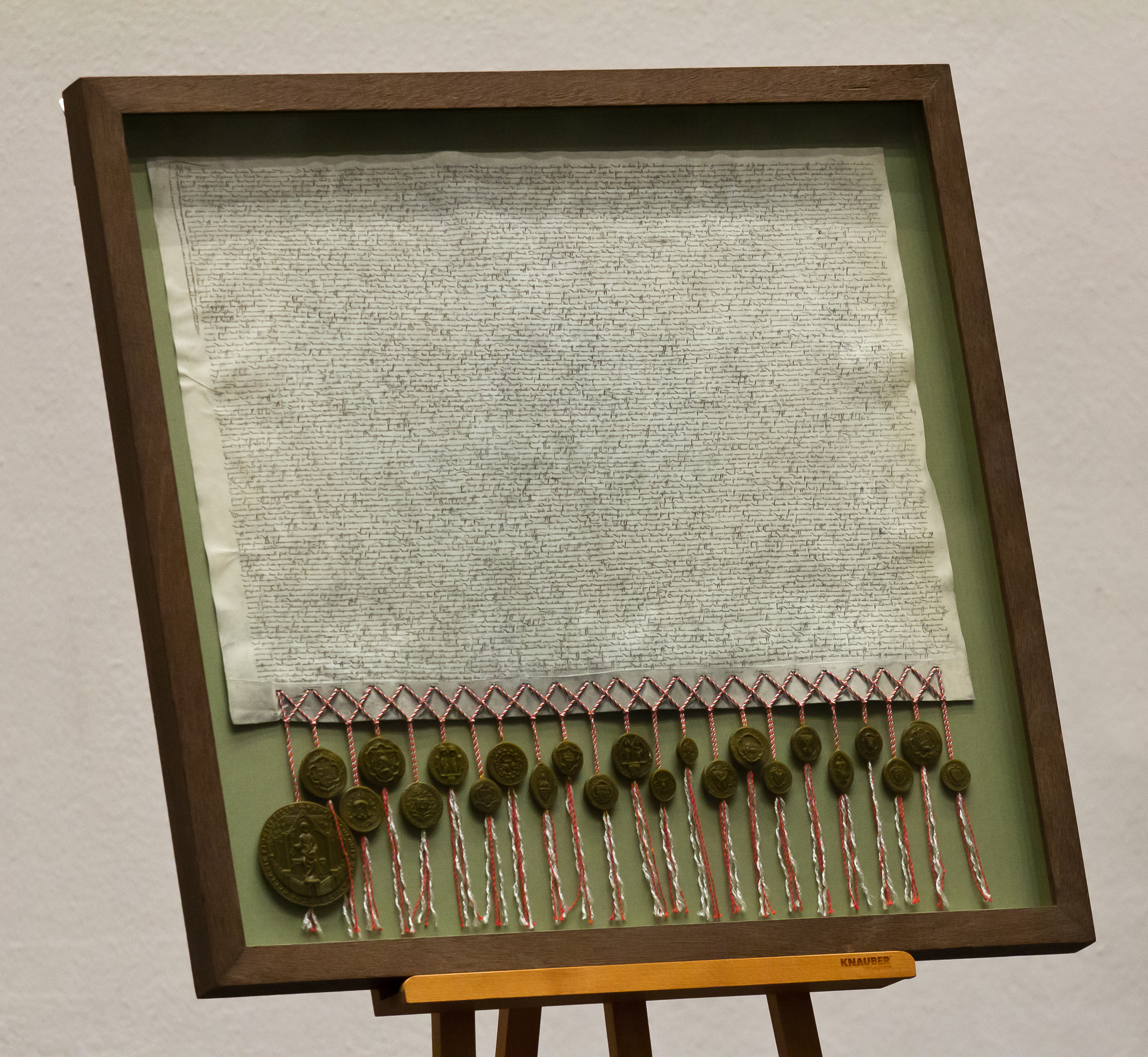 Am 14. Dezember 2013 fand im Historischen Rathaus zu Köln der Festakt zu 500 Jahre Kölner Transfixbrief statt: Am 15. Dezember 1513 haben die Stadt Köln und die 22 Gaffeln den sogenannten Transfixbrief als Zusatz zum Verbundbrief von 1396 ausgefertigt. Als Festredner schlug Martin Schulz, Präsident des Europäischen Parlaments, die Brücke zwischen den ersten Ansätzen von Bürgerrechten zu unserer heutigen Demokratie. Foto: ein Faksimile des Transfixbriefes